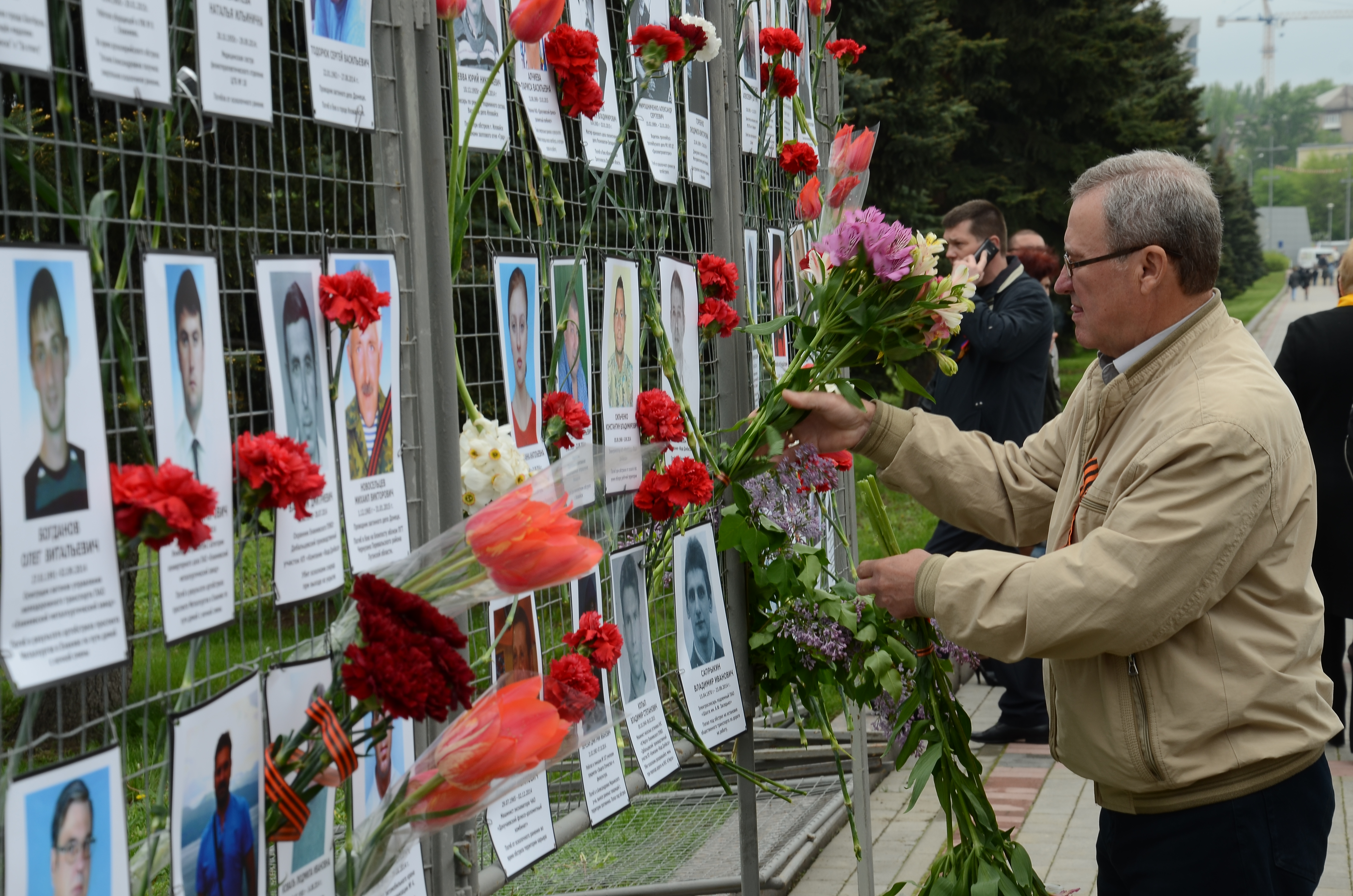 День Победы в Донецке